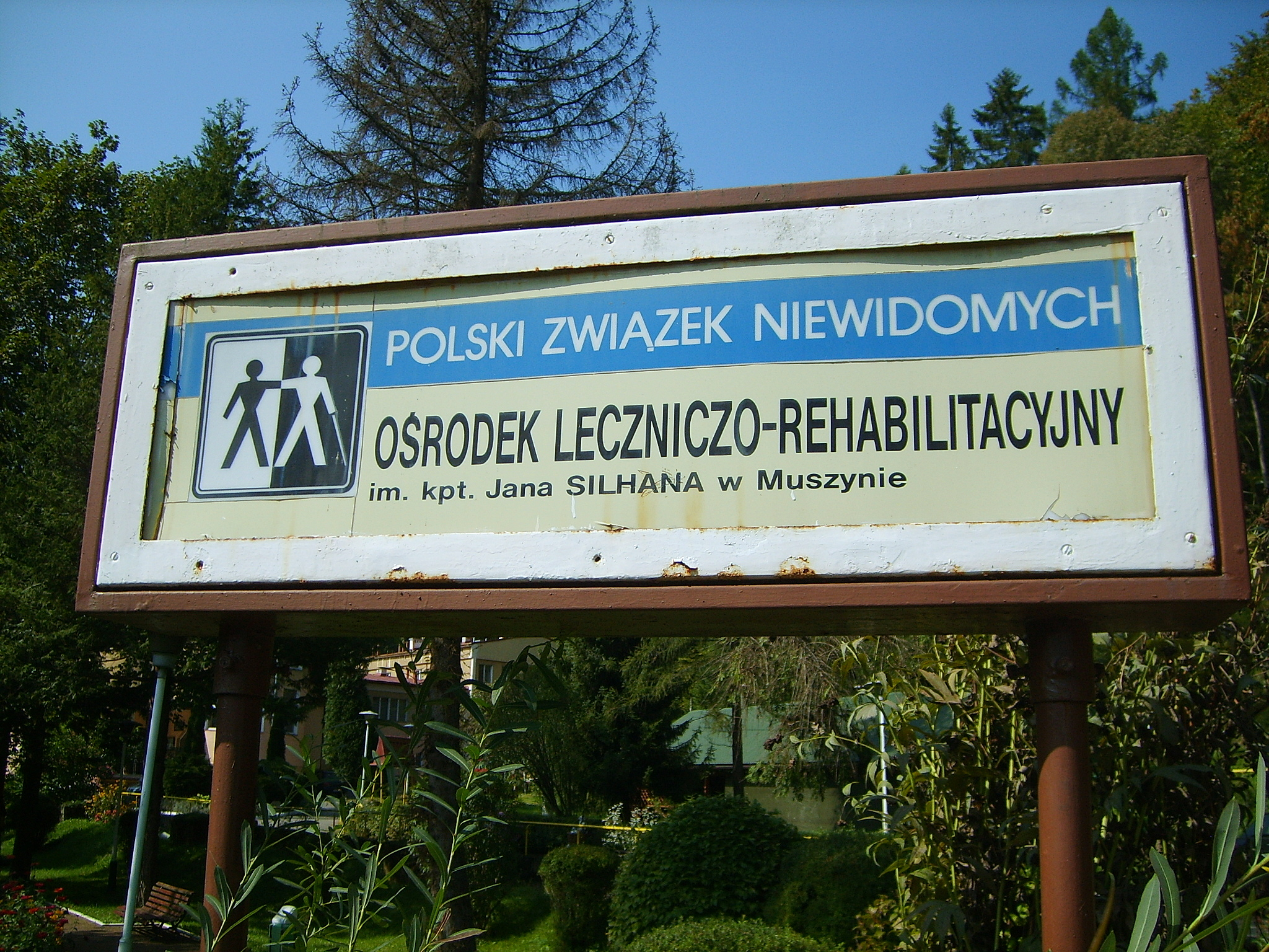 Ośrodek Leczniczo-Rehabilitacyjny im. kpt. Jana Silhana w Muszynie.